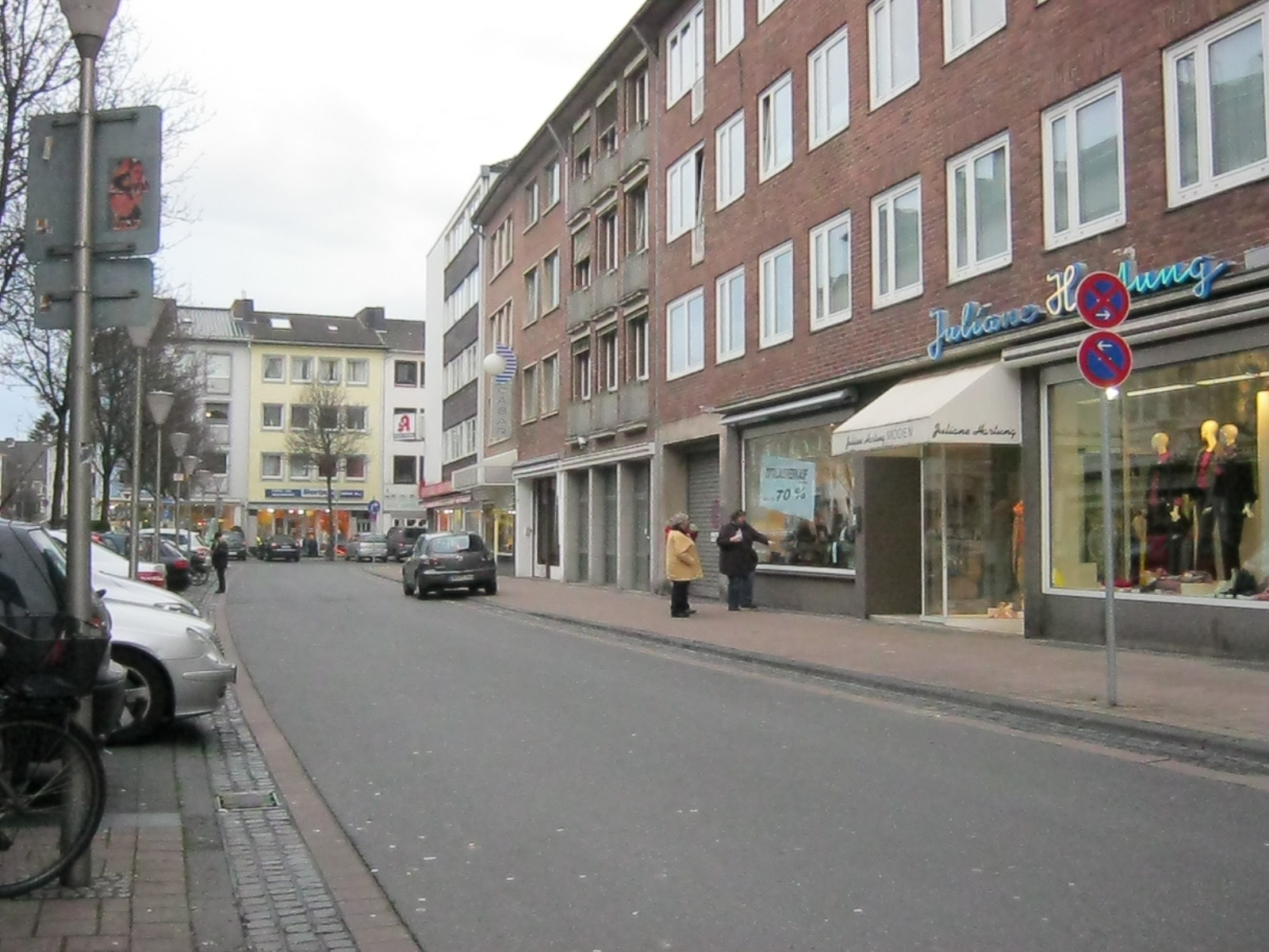 Weierstraße in the city of dueren